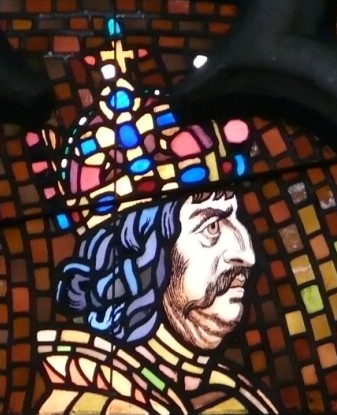 Jiří z Poděbrad